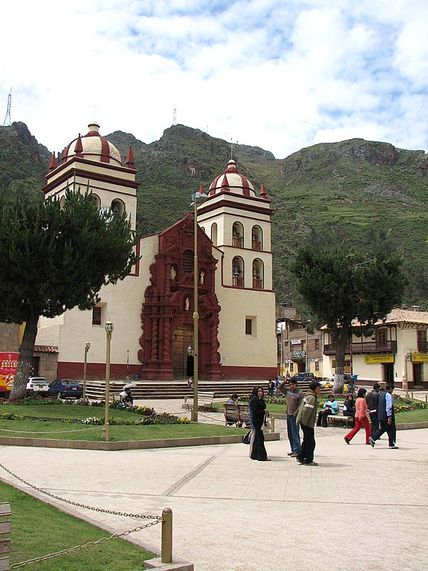 Una vista de la catedral de Huancavelica.